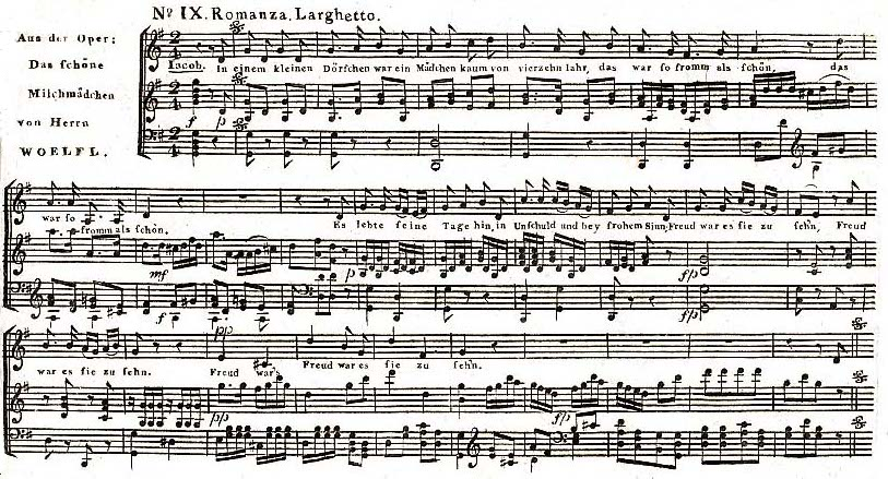 Romanza extraite de l'opéra du compositeur Joseph Woelfl "Das Schöne Milchmädchen"